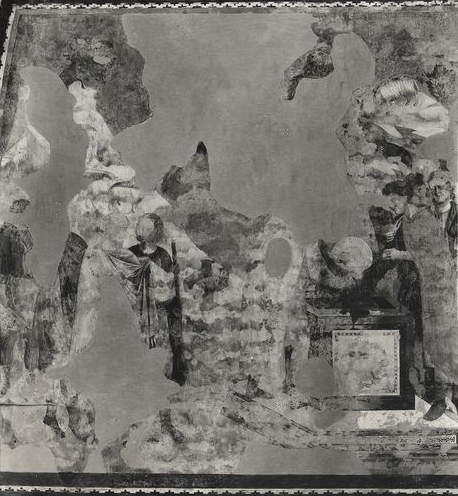 Giuseppe venduto dai fratelli